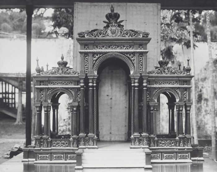 Foto. Model van een Madoerenggo (vooraanzicht) in het museum van Surakarta